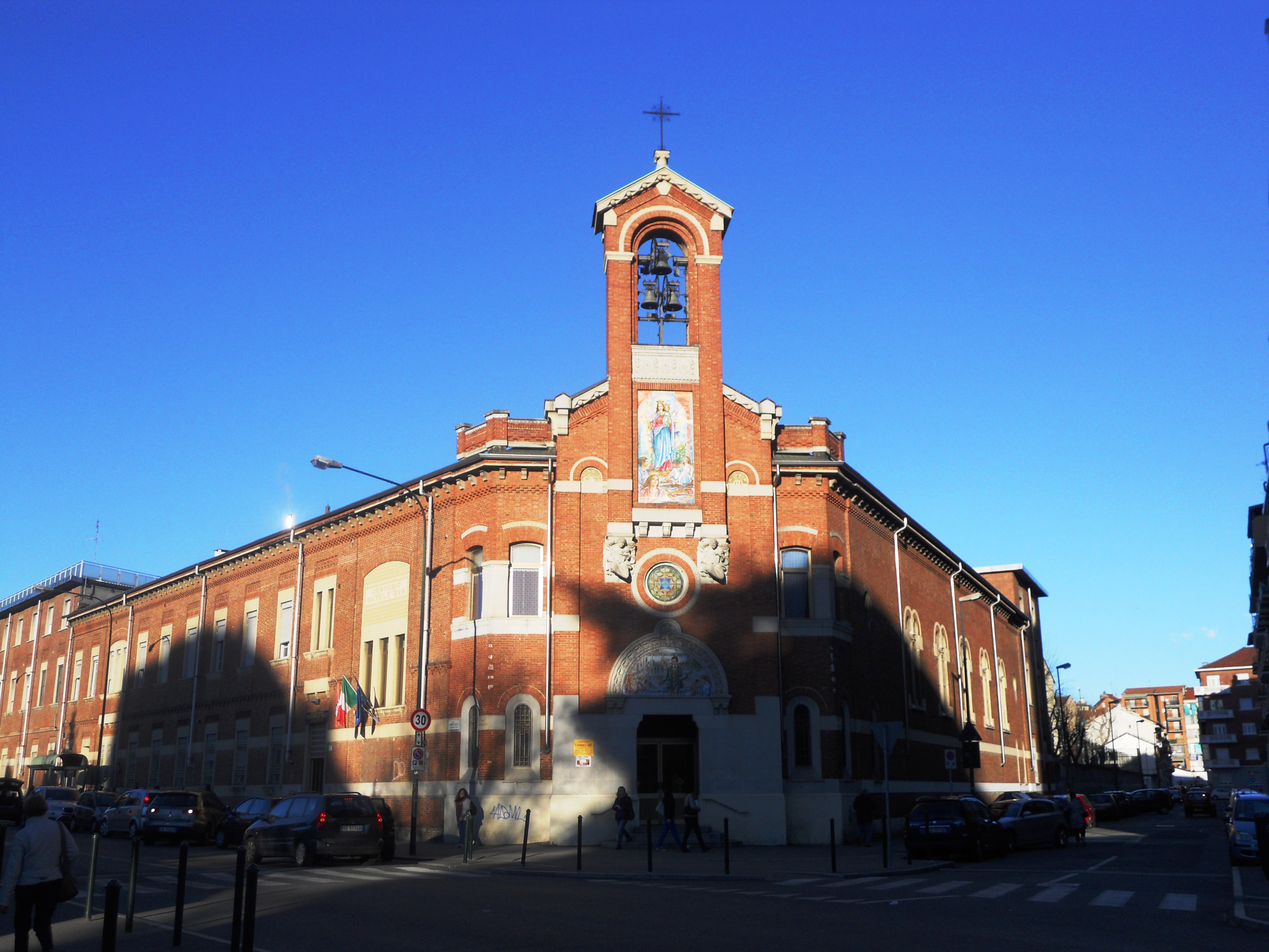 Chiesa Michele Rua al mattino